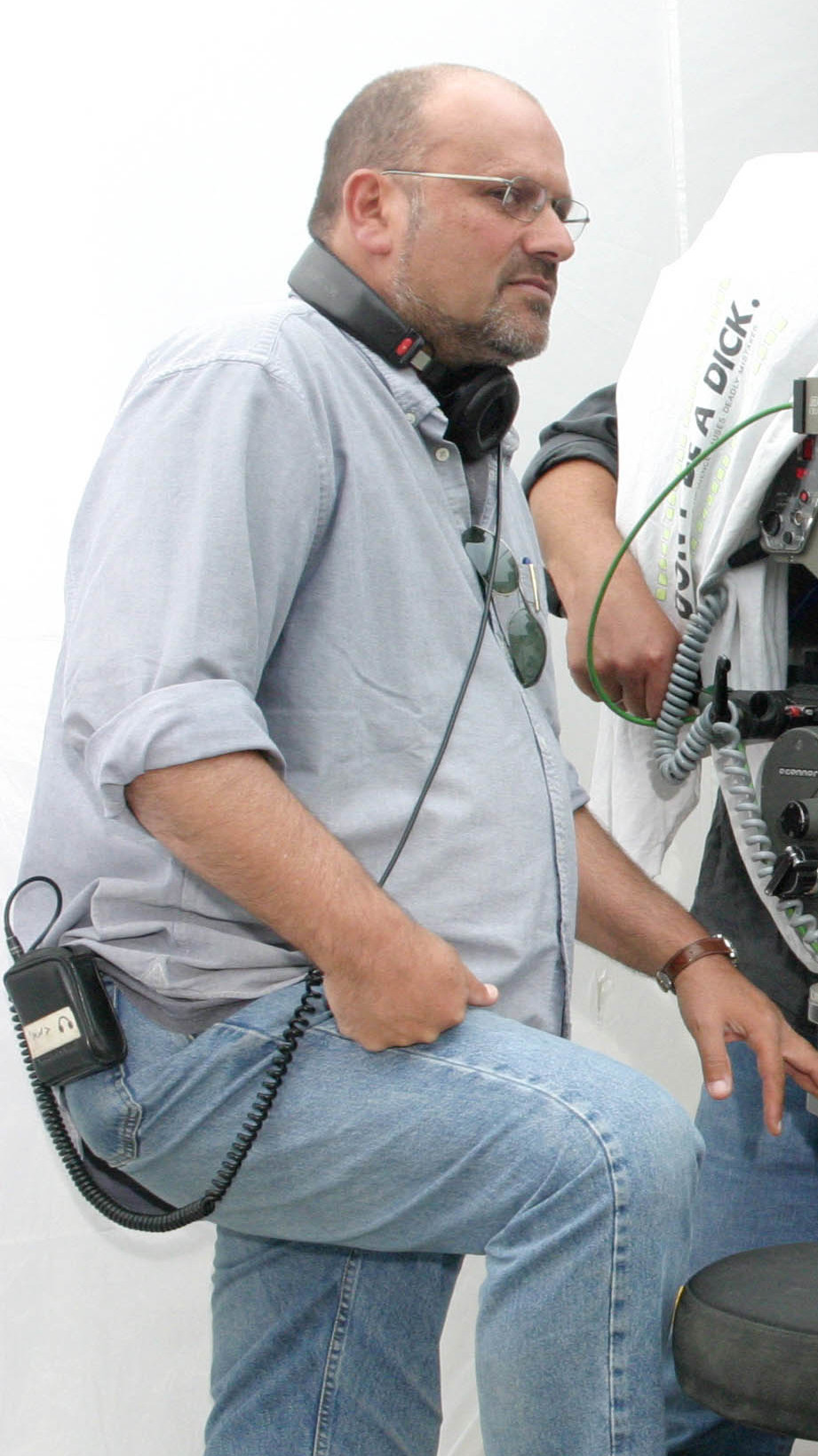 מכרם ח'ורי וקלרה ח'ורי, השמאלי ביותר ערן ריקליס, בסרט "הכלה הסורית"